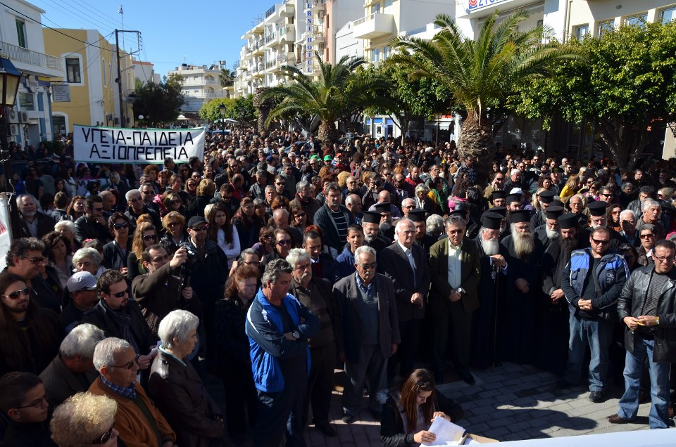 Με ένα μεγαλειώδες συλλαλητήριο, που προηγούμενο του δεν έχει γνωρίσει η Ιεράπετρα, ανταποκρίθηκαν χιλιάδες πολίτες , κάτοικοι και φοιτητές της πόλης, στο κάλεσμα της Ανοιχτής Επιτροπής Αγώνα για την υπεράσπιση του τόπου τους, της ζωής και της κοινωνίας. Στο συλλαλητήριο απαίτησαν να μη μεταφερθεί το ΤΕΙ Ιεράπετρας και να μην υποβαθμιστεί ή κλείσει το μοναδικό νοσοκομείο της περιοχής.